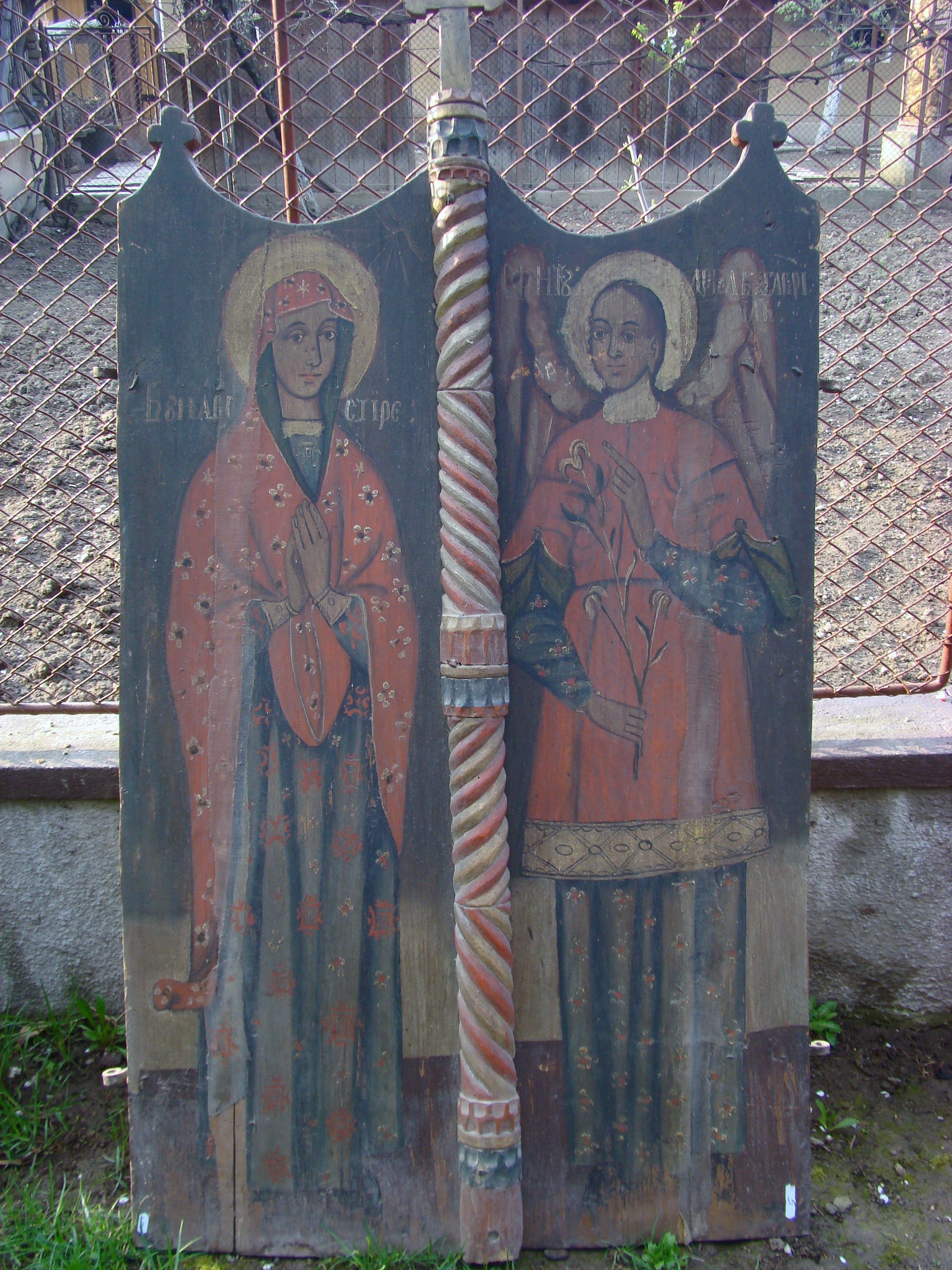 Biserica de lemn din Tinca, județul Bihor